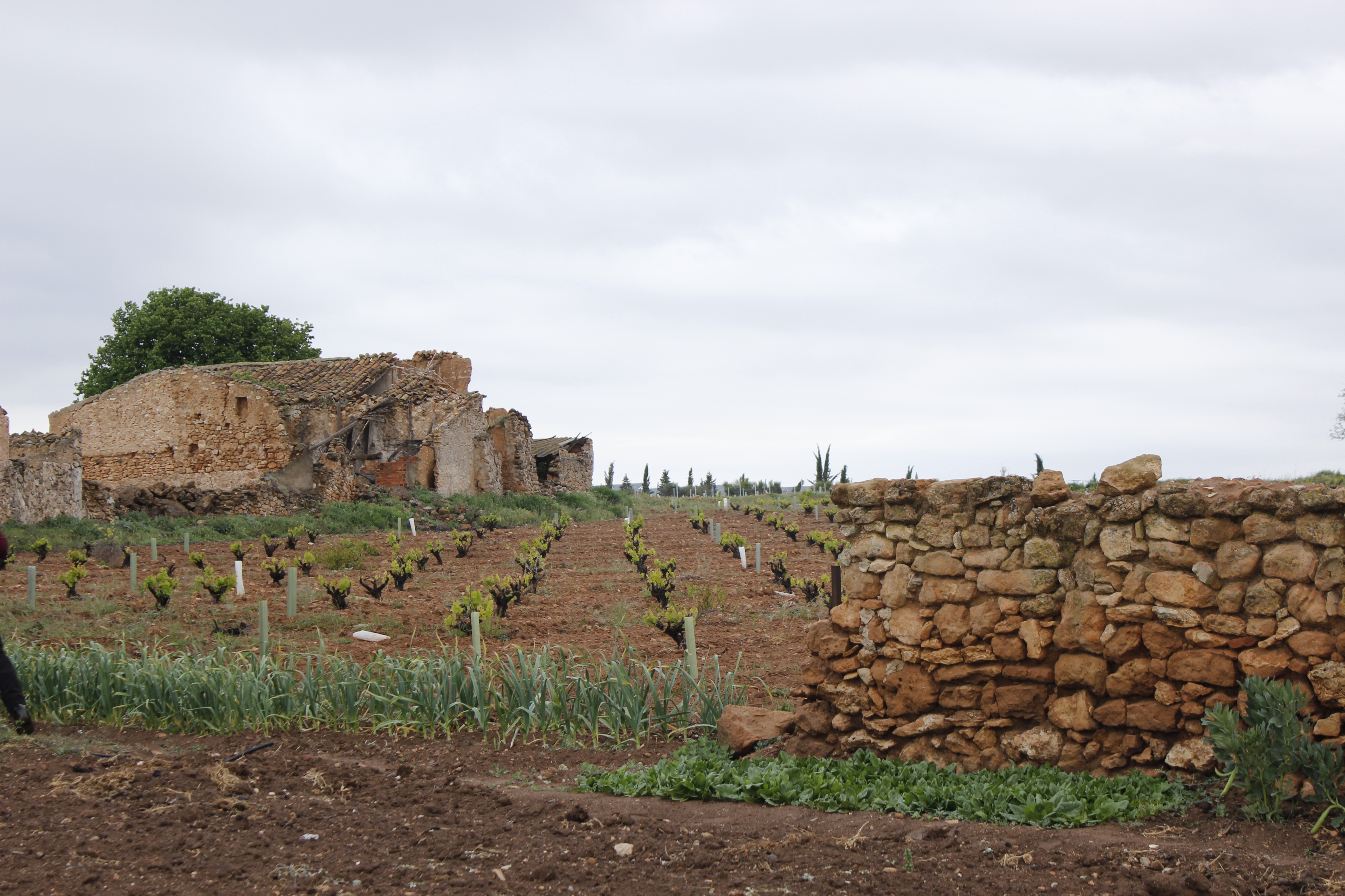 Pendiente